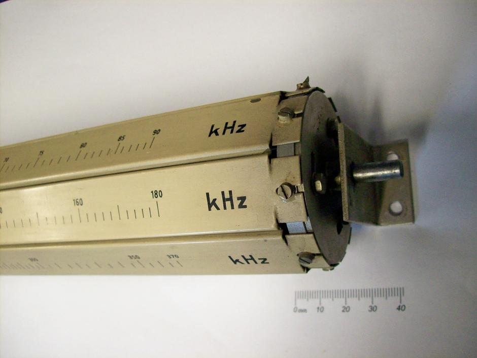 Revolverskala v. einem Messsender